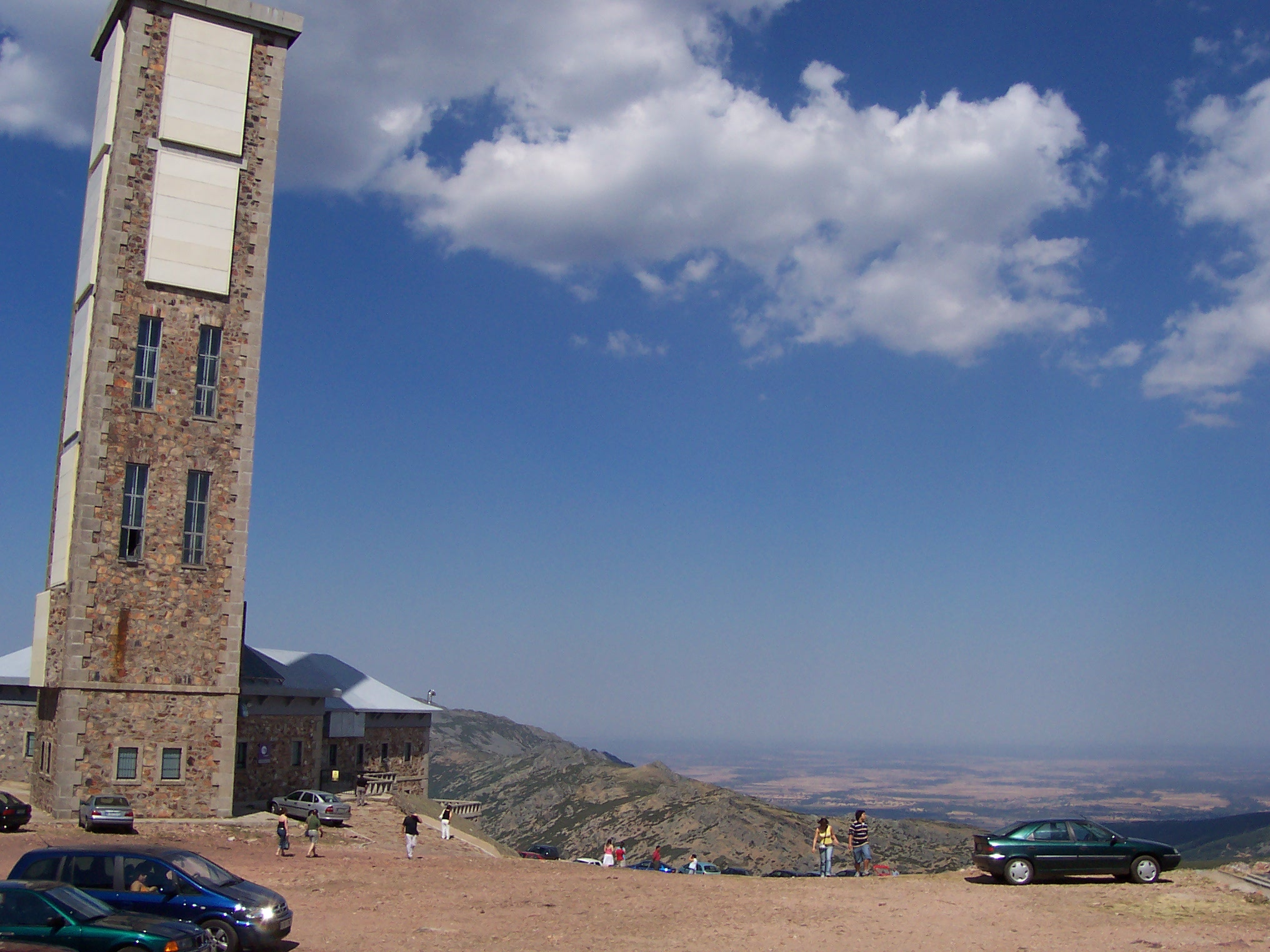 Repetidor de telecomunicaciones en la cima de la Peña de Francia (Salamanca), a 1723 m de altura.